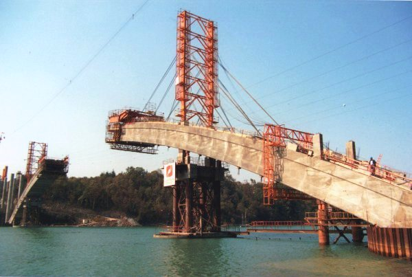 Pont de châteaubriand - Construction de l'arc en béton armé avec haubanage provisoire